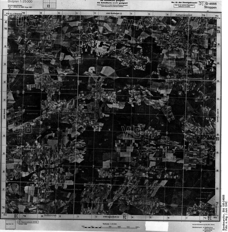 Stroppen